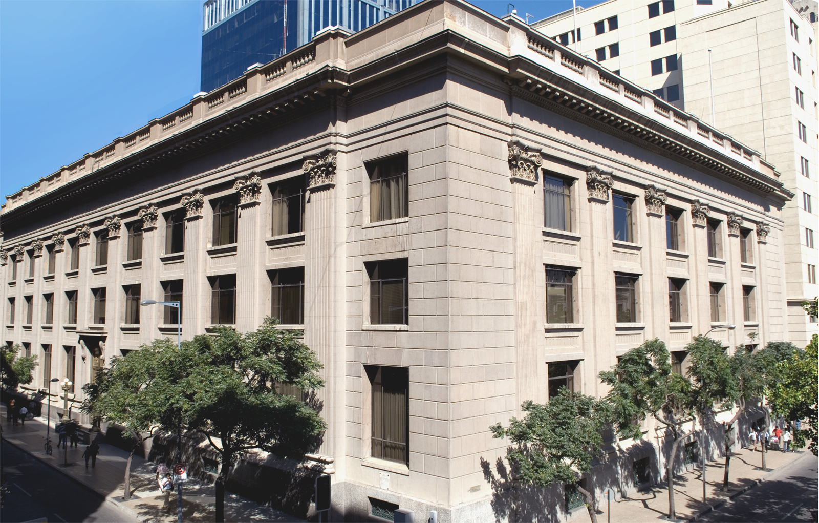 Vista exterior edificio BCCh